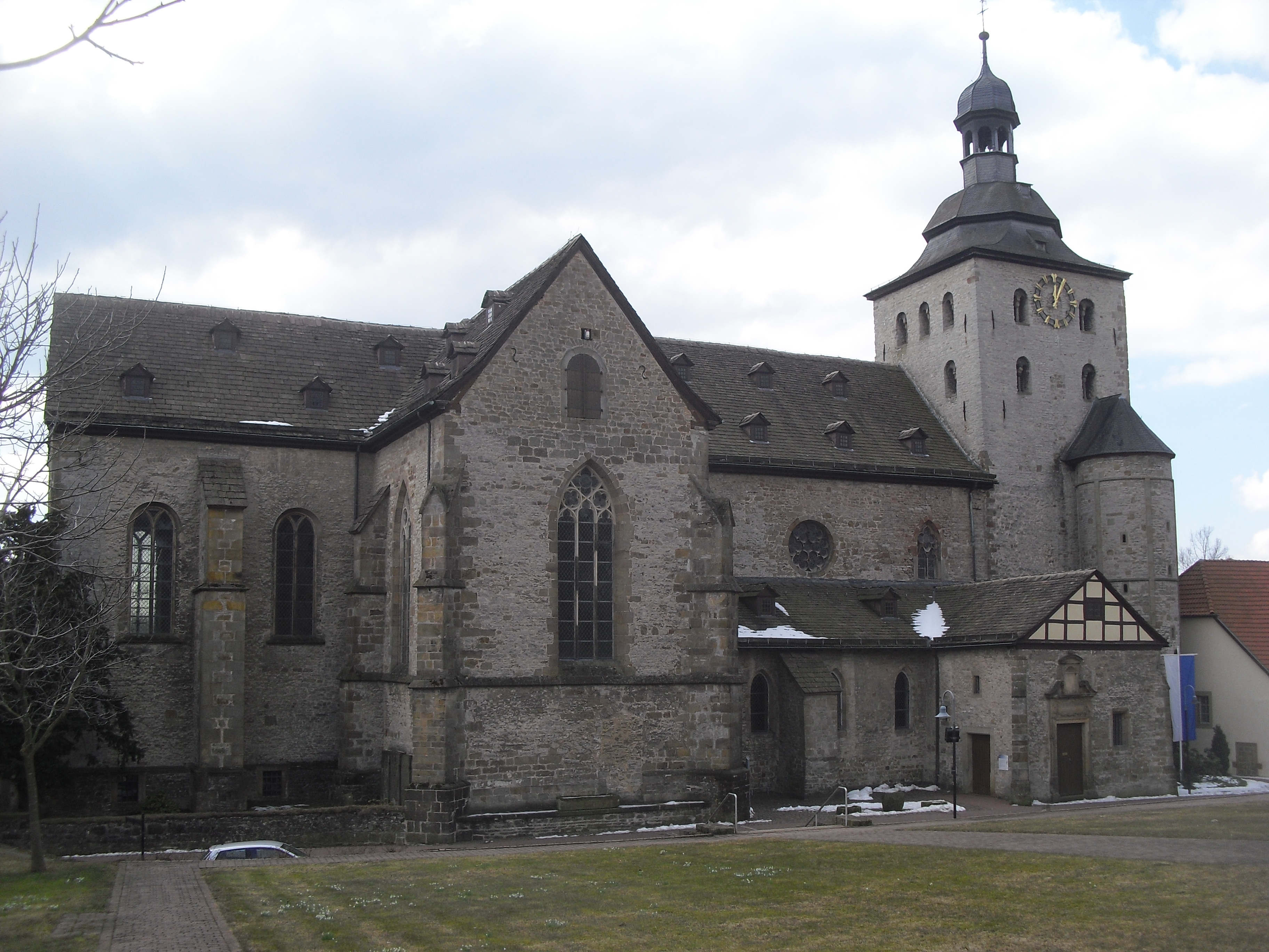 Nordseite der Stiftskirche in Neuenheerse